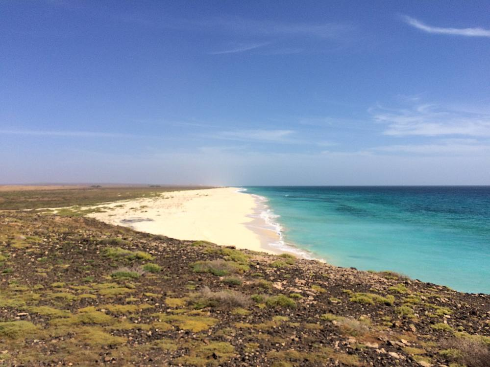 pláž východně od Curral Velho, João Barrosa